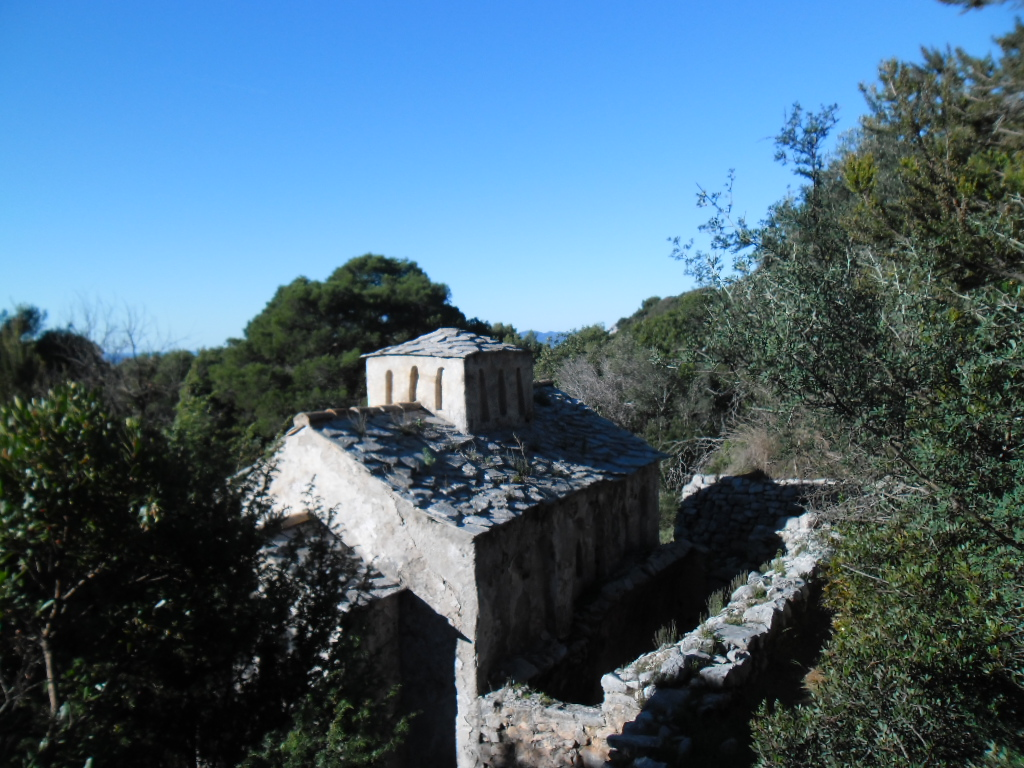 crkvica na otoku Lopudu